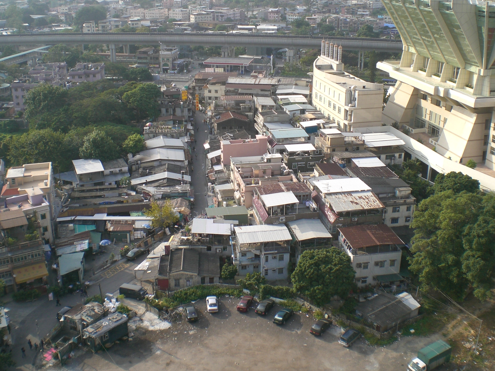 妙法寺近屯門新村